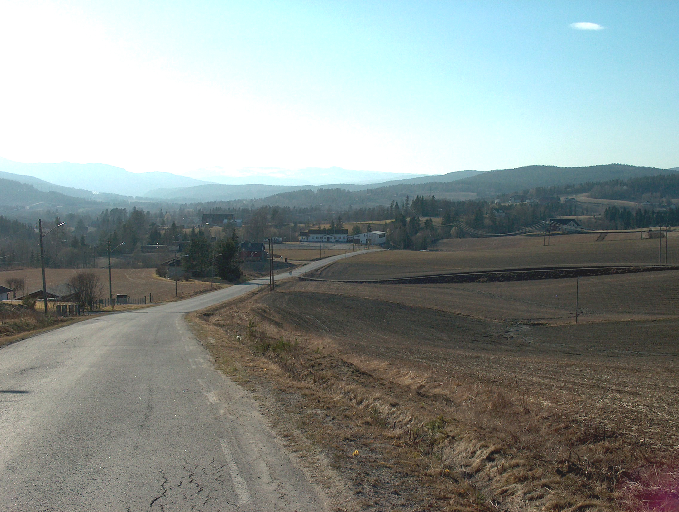 Utsyn over Heggen mot Veme i Soknedalen